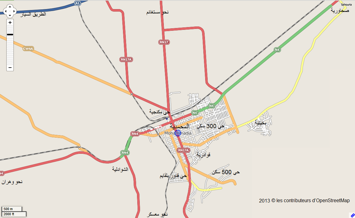 carte OSM mohammadia algérie